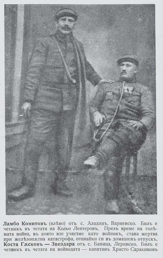 Ламбо Комитов (отляво) от село Аладън, Варненско (днес Страшимирово) и Коста Гъсков Звездара (отдясно) от Баница, Леринско, дейци на ВМОК